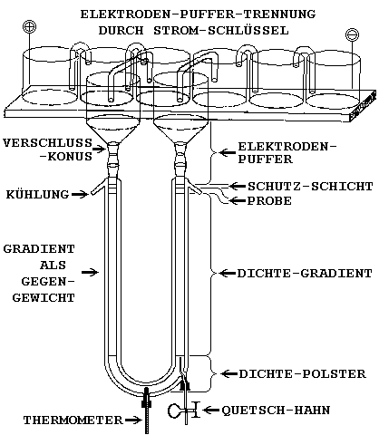 Zeichnung eines Systems zur Dichtegradientenelektrophorese